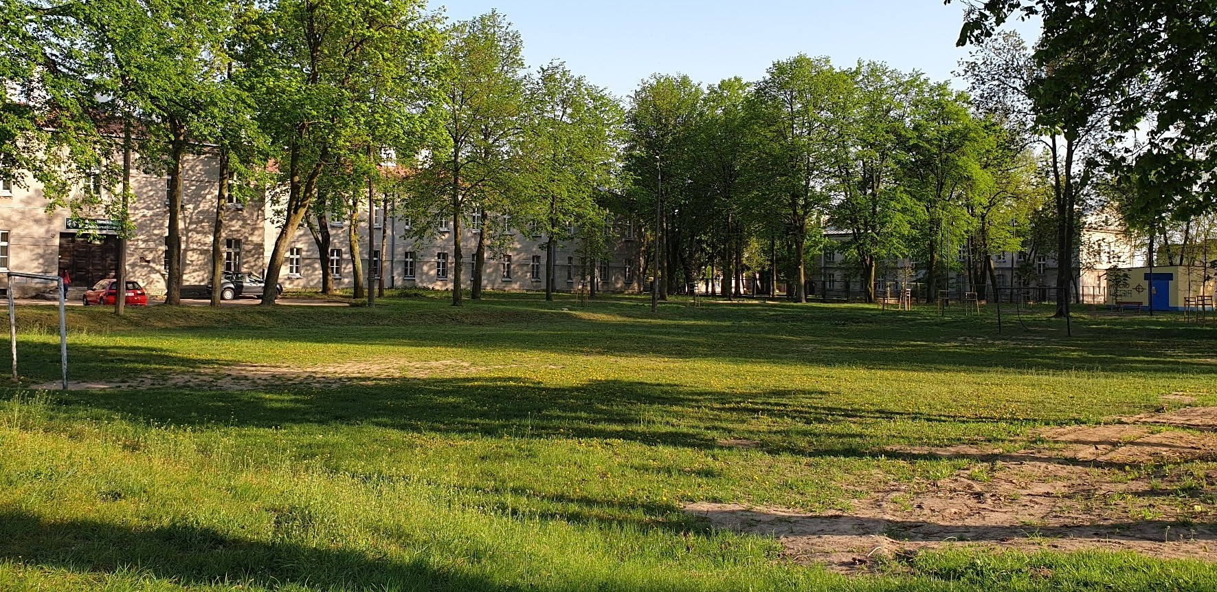 Garnizon Przasnysz, koszarowiec nr 7 i nr 6